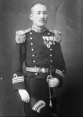 日本国海軍少将